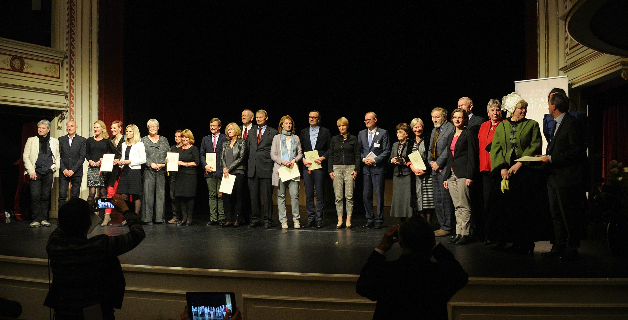 Verleihung des Deutschen Preises für Denkmalschutz 2016 in Görlitz.